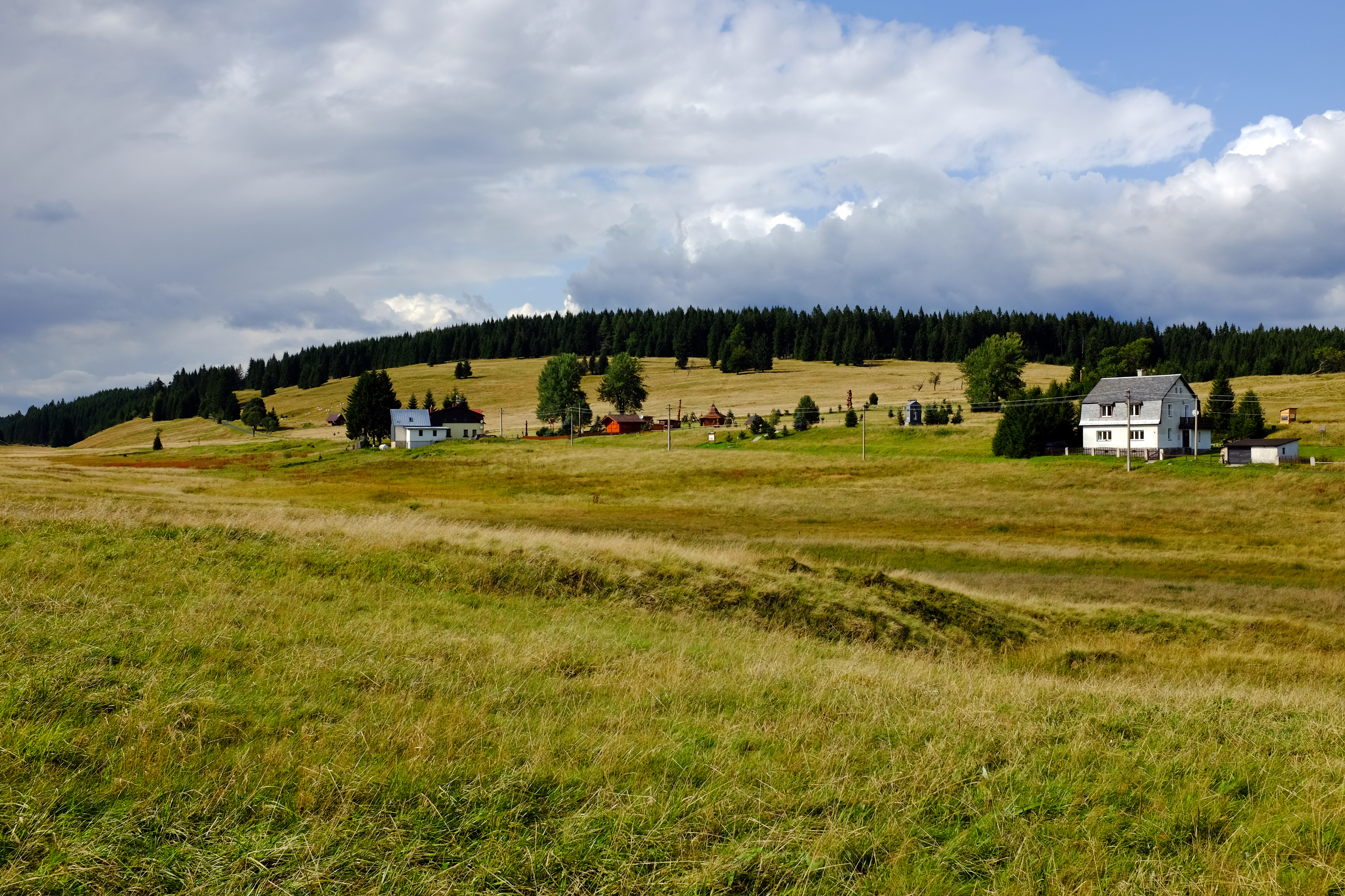 Jelení, zaniklá obec v Krušných horách, v pozadí Liščí hůrka (934 m), okres Karlovy Vary